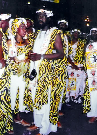 Foto do Bloco afro ILê Aiyê tirada por minha familia.